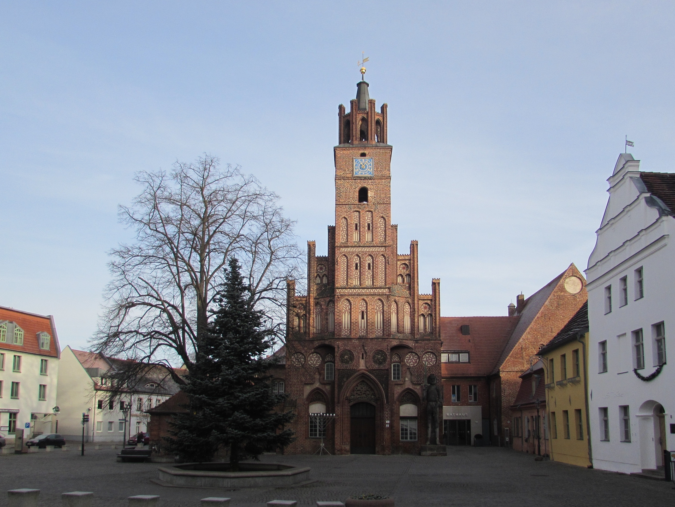 rathaus brandenburg altstadt